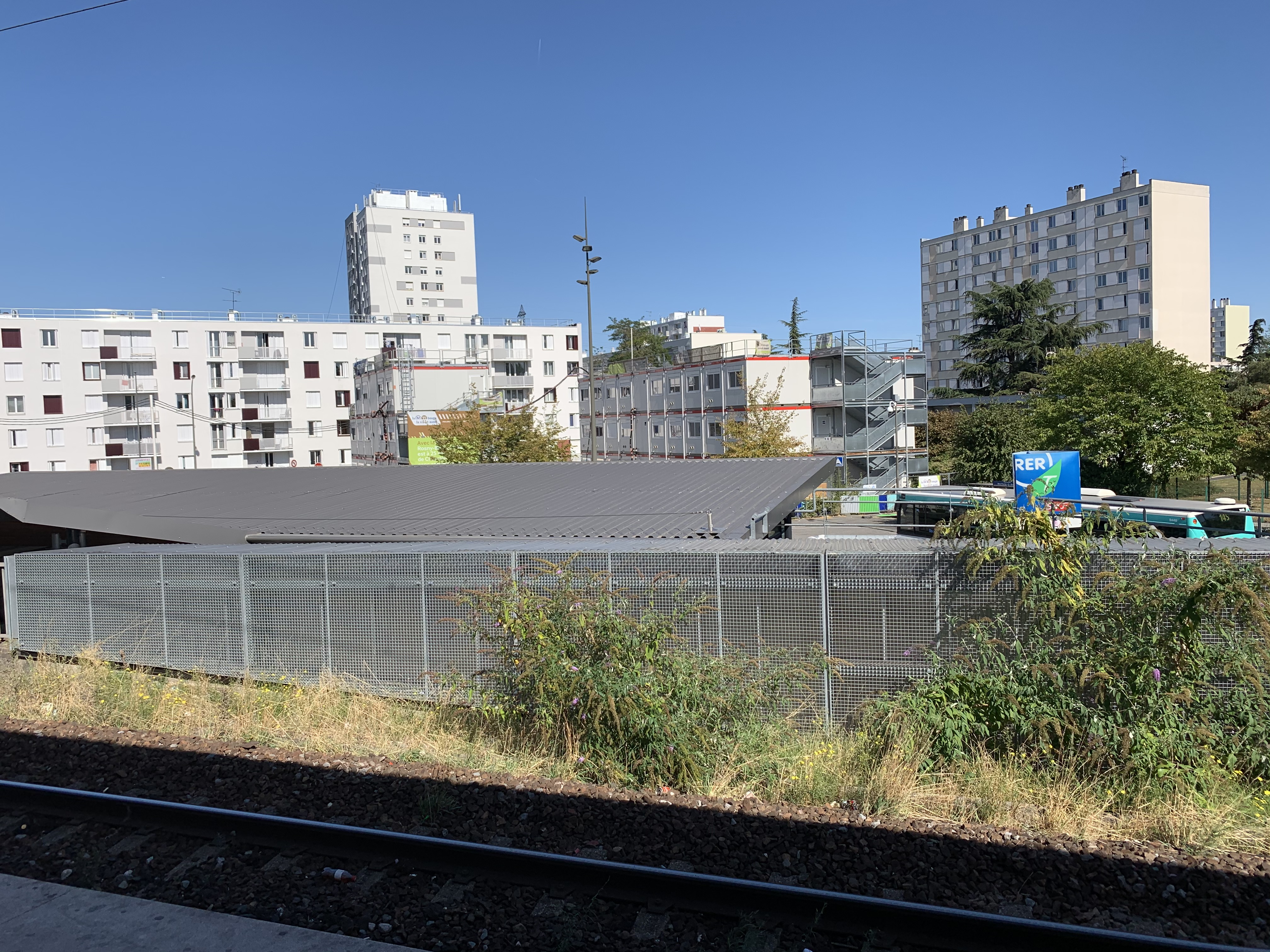 Chantier du prolongement de la ligne 11 du métro au niveau de Rosny-Bois-Perrier, Rosny-sous-Bois.